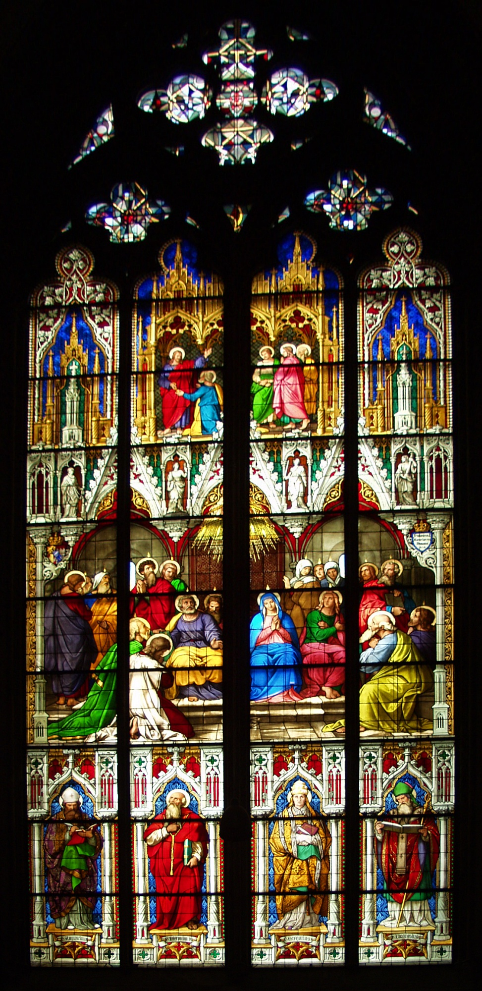 Kölner Dom - Bayernfensterl